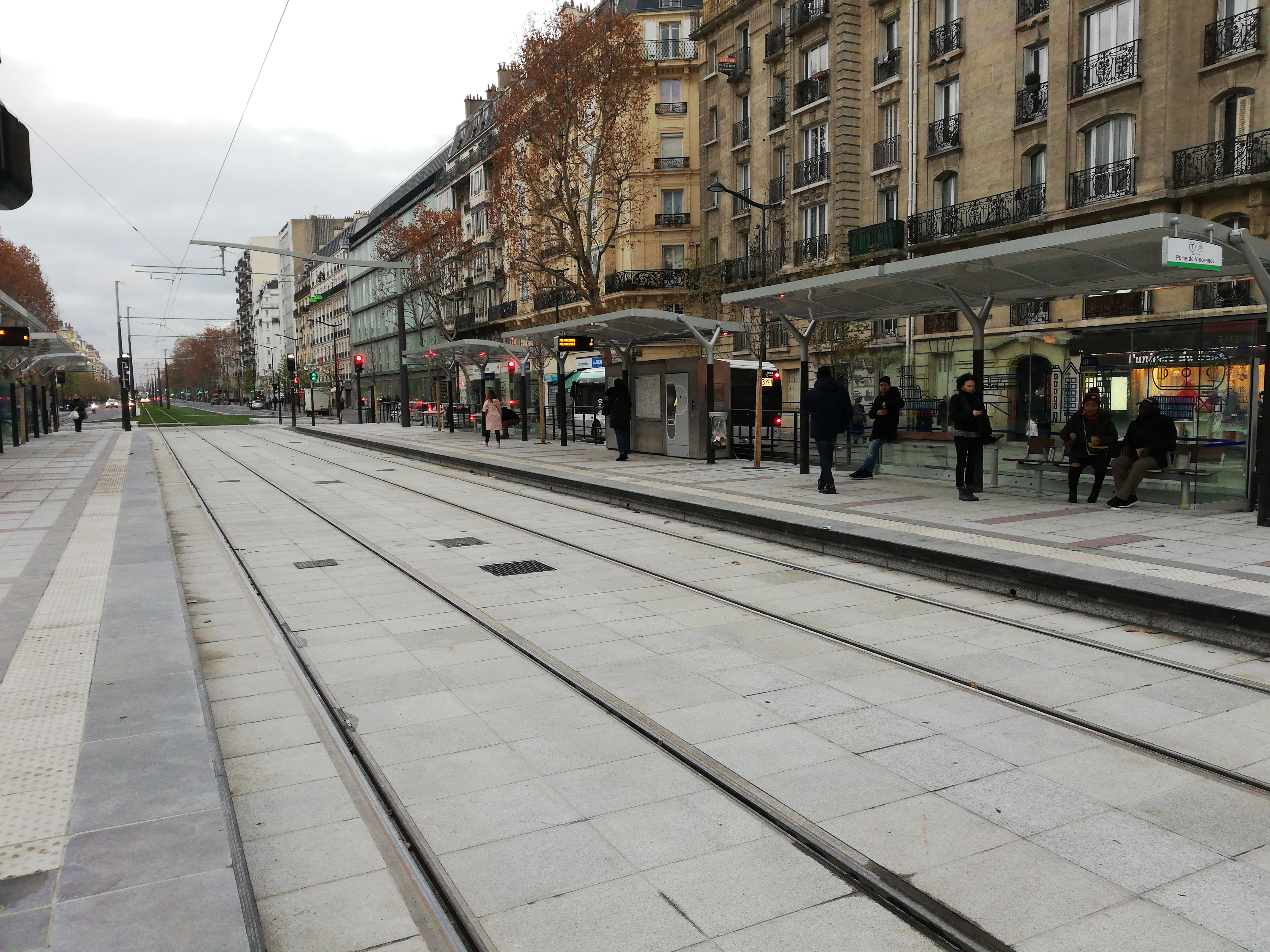 Station Porte de Saint-Ouen de la ligne 3b du tramway d'Île-de-France, le jour du prolongement de la ligne de Porte de la Chapelle à Porte d'Asnières, en 2018.